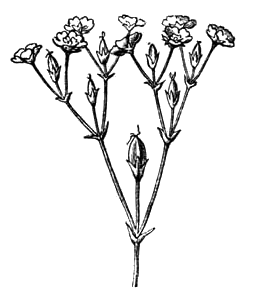 zweistrahlige Trugdolde oder Dichasium